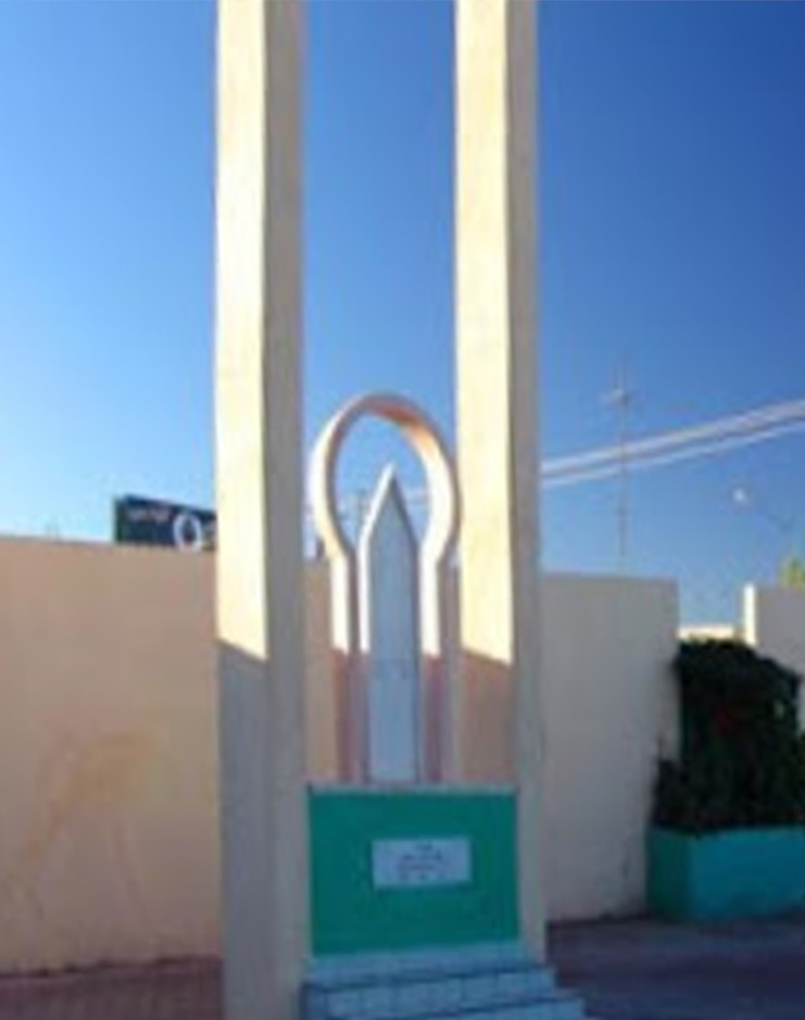 Tumba que guarda los restos que se creen son del Gral. Pedro Meoqui